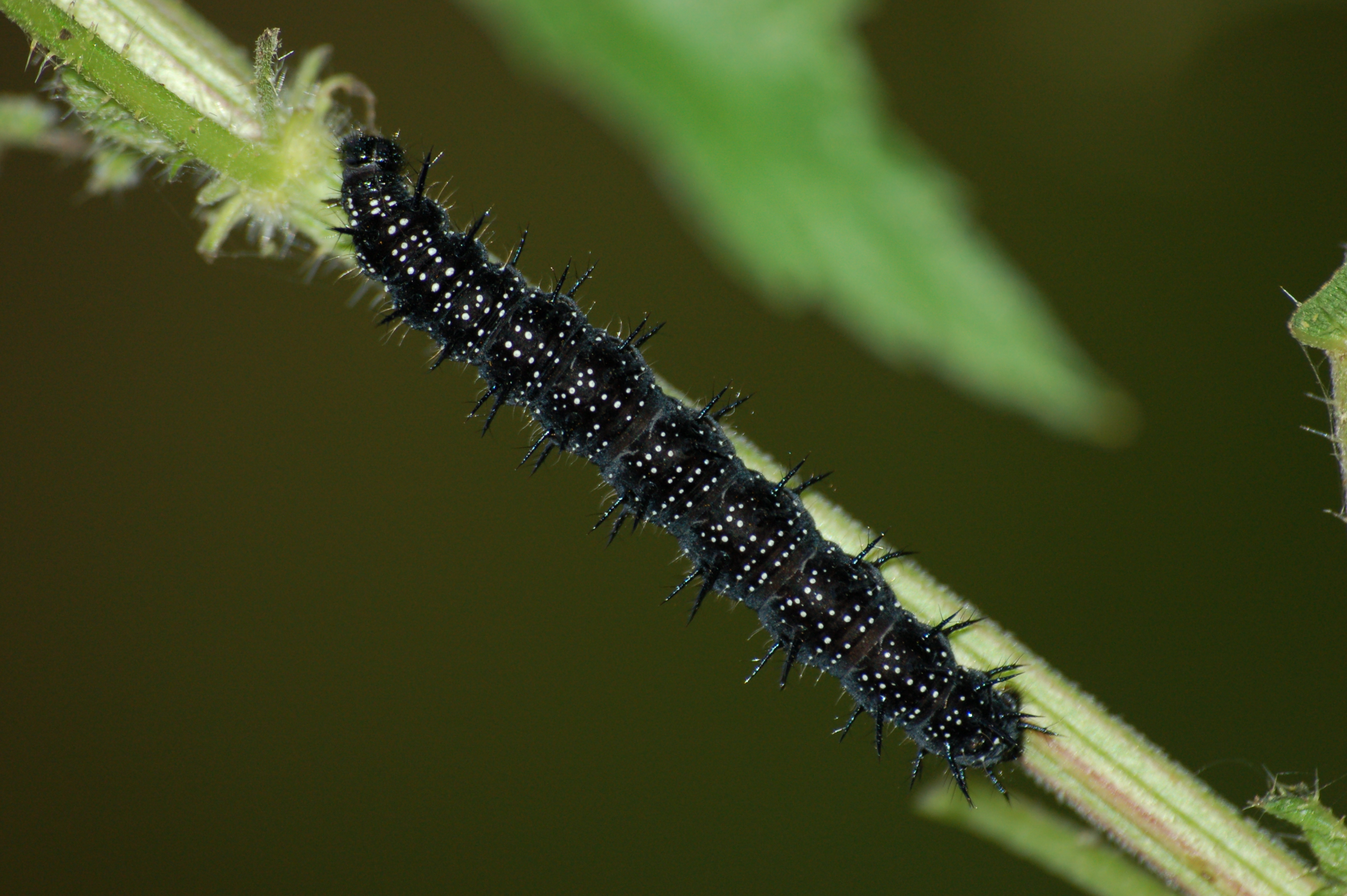 Larwa motyla rusałka pawik (Inachis io)